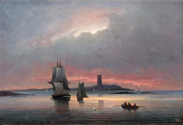 Sandhamn, Kvällsutsikt från Tullhuset av Elias Sehlstedt målad i olja under 1860-talet